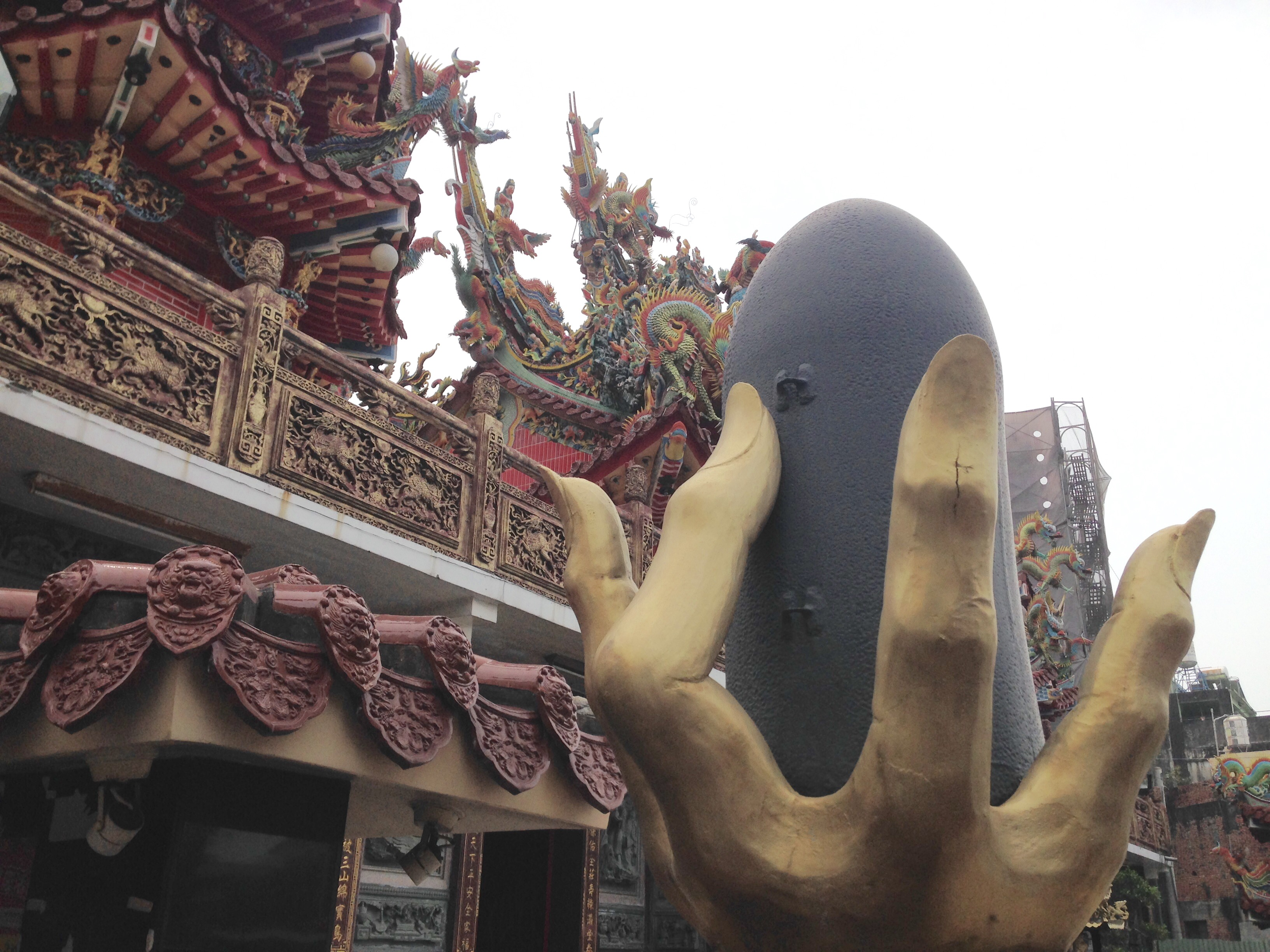 萬丹鄉萬惠宮的媽祖接炸彈塑像